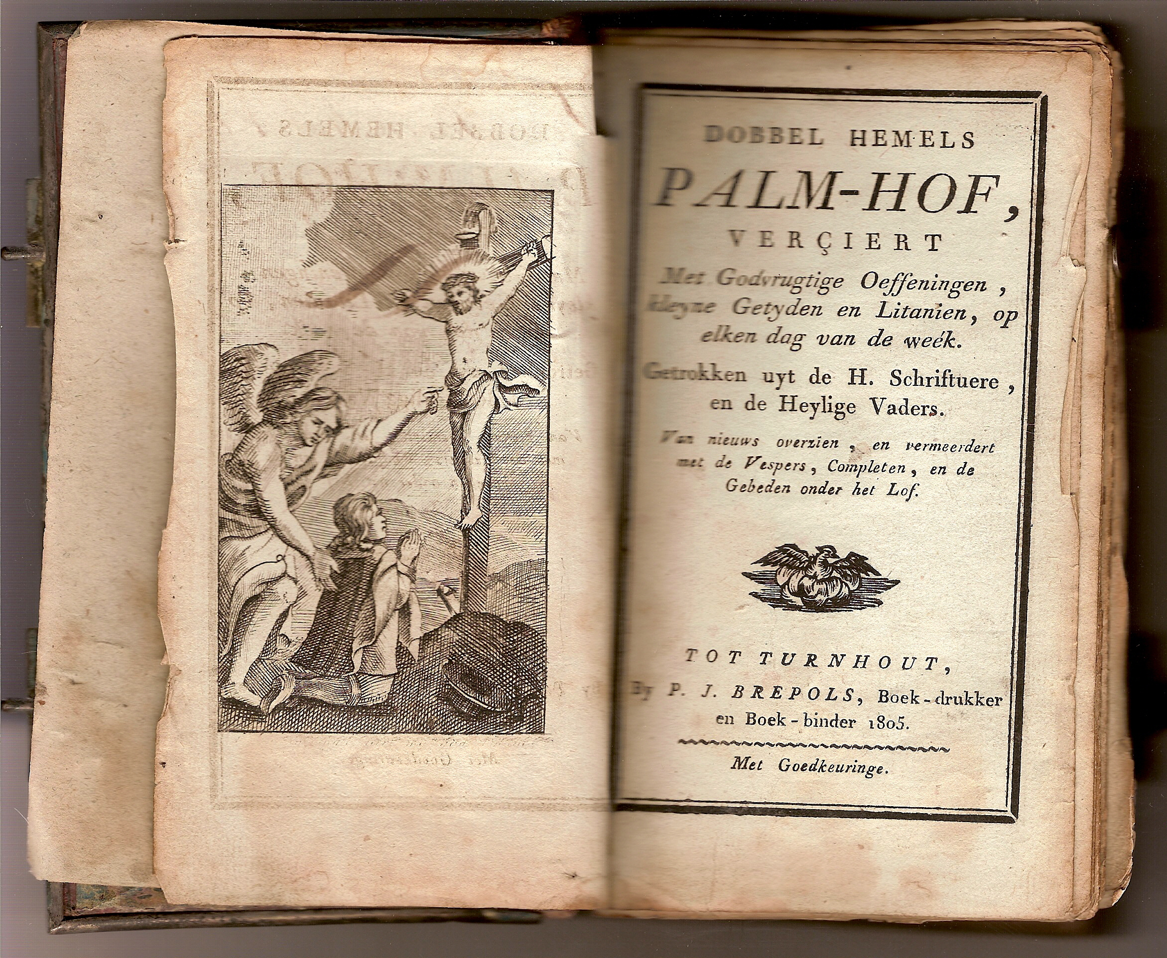 Titelpagina en frontispice van Dobbel Hemels Palm-hof, 1805. Scan van exemplaar uit eigen collectie.